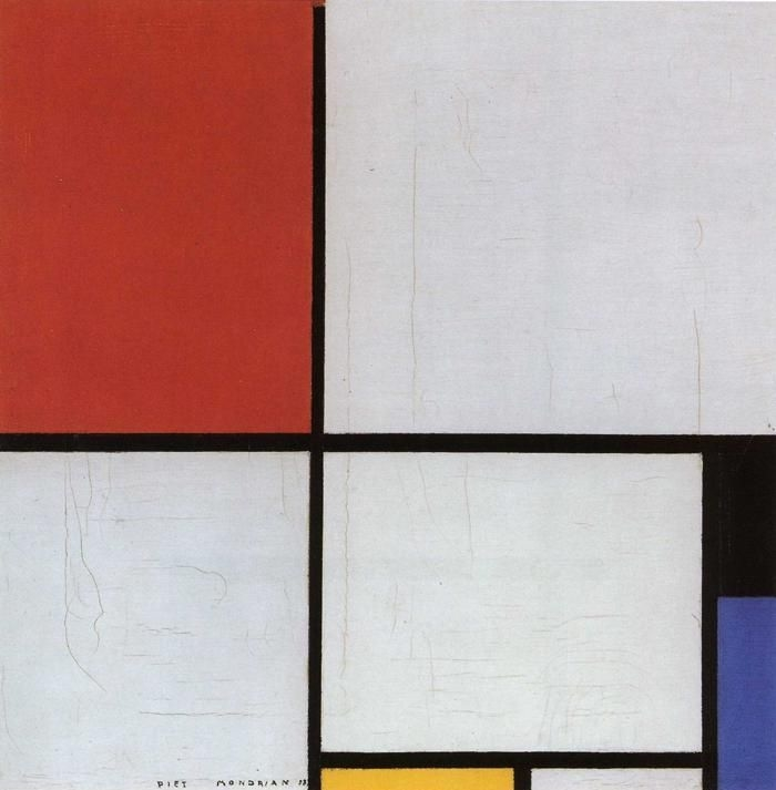 Kompozicija s crvenom, crnom, plavom i žutom